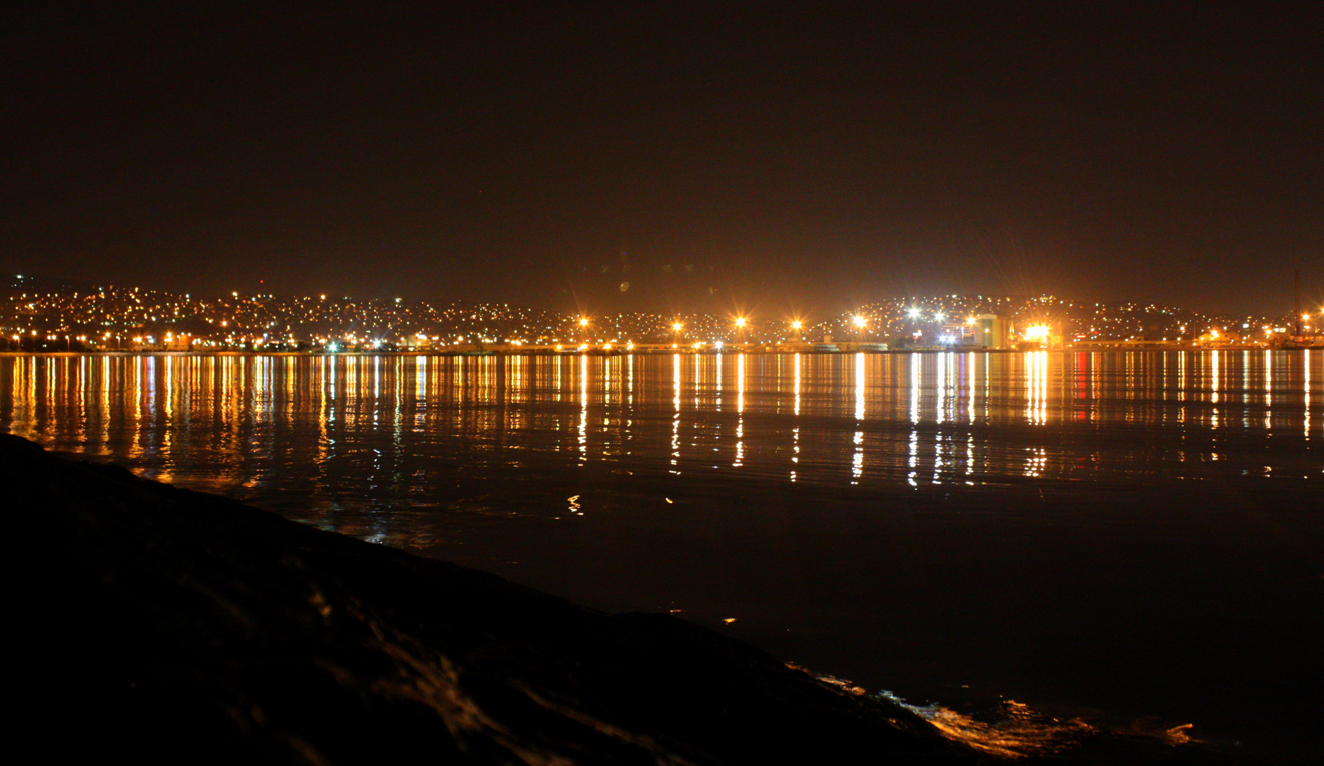 İZMİR de gece